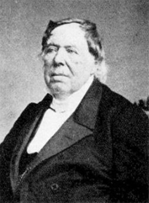 Carl Gustaf Cassel, född 1783-10-04 i Skänninge, död 1866-11-02 i Stockholm